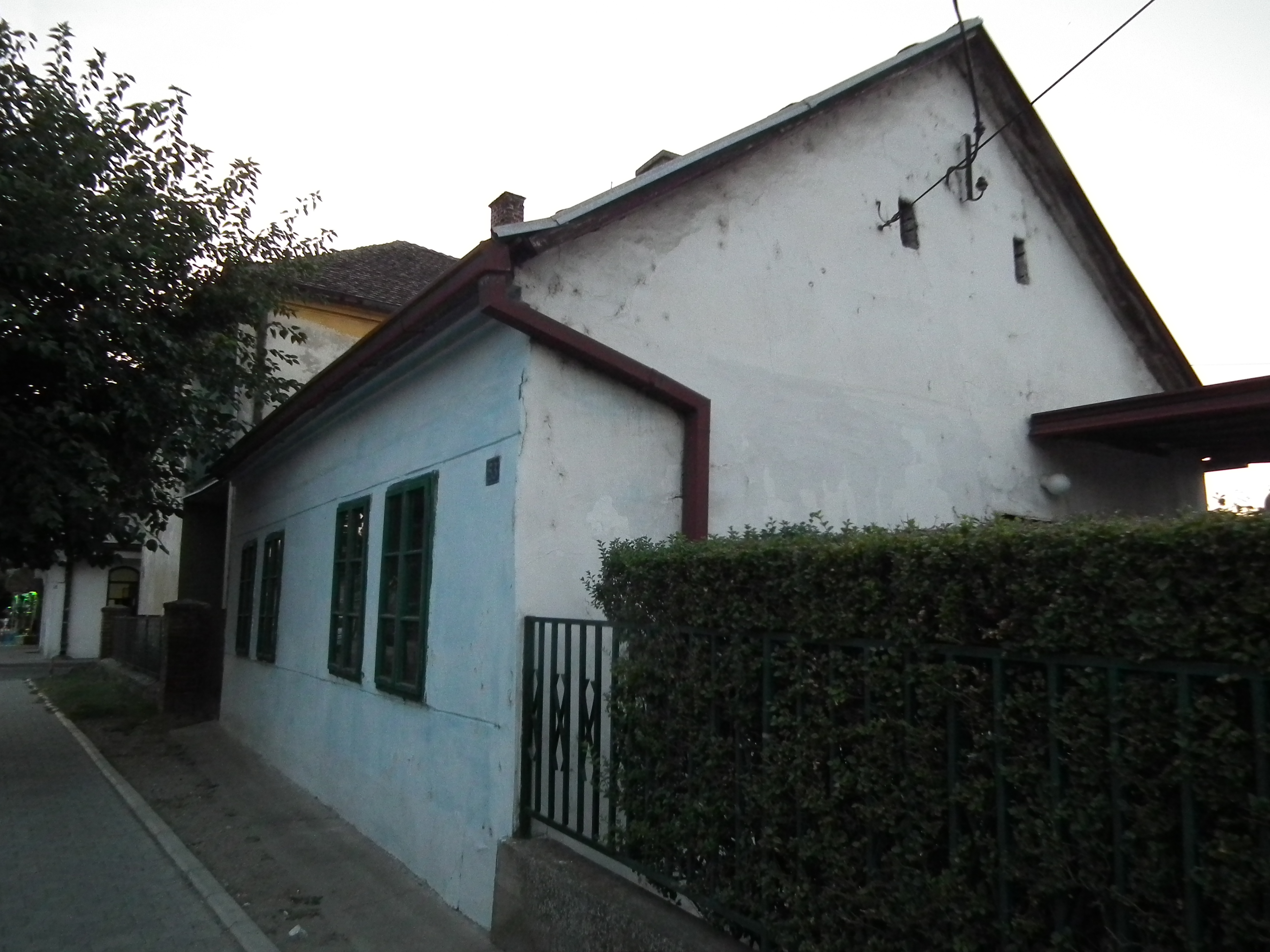 Митровићева кућа у Гроцкој,једна од ретких сачуваних. Дискутабилно је да ли је ово прави објекат. Не изгледа као објекат на слици на сајту Завода, а ни број куће није исти.